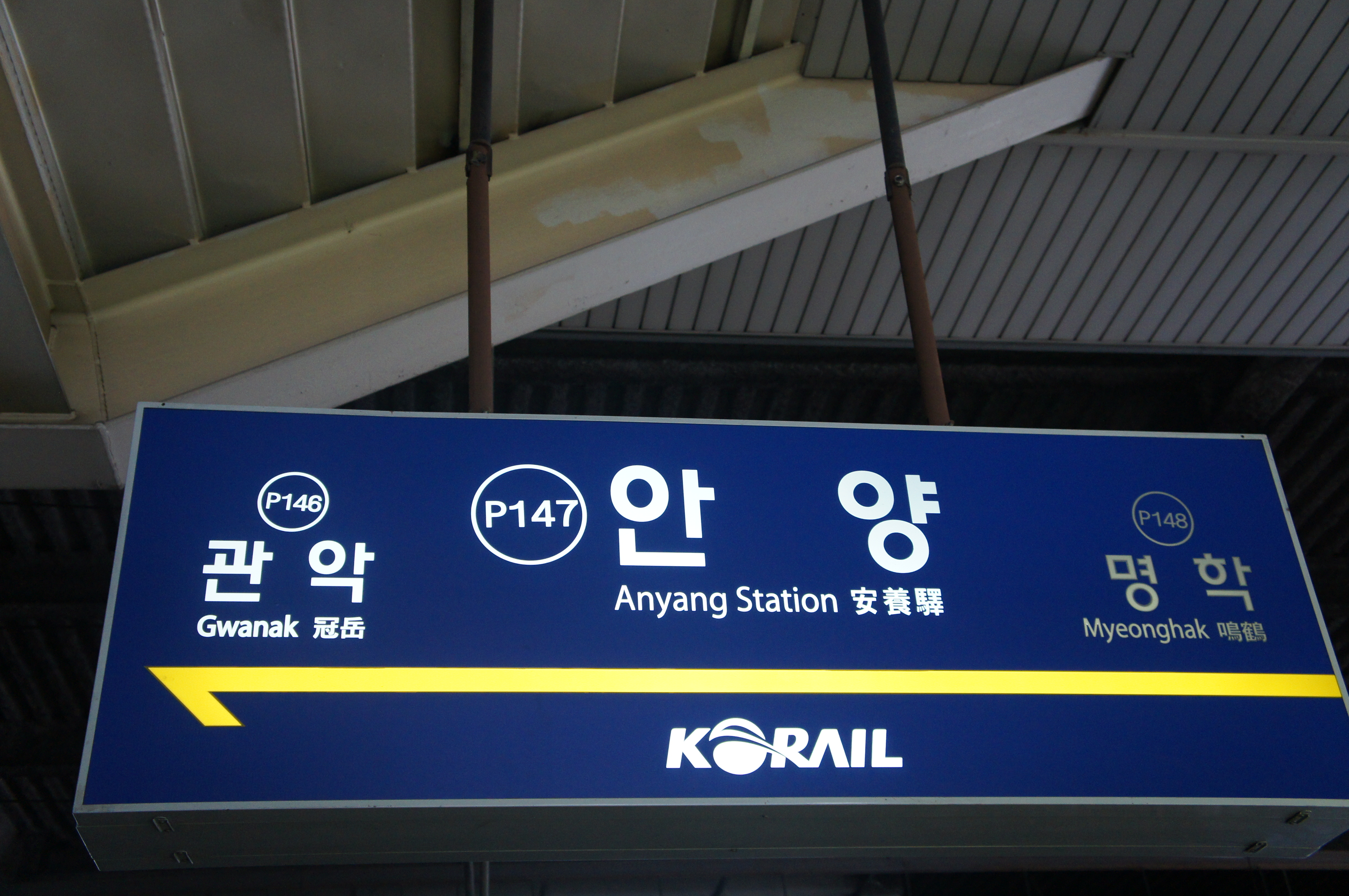 안양역 역명판